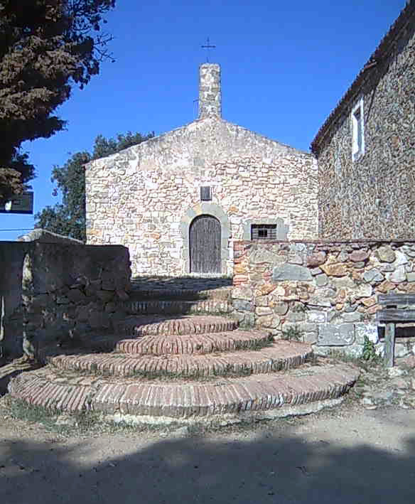 Ermita de Sant Mateu del Bosc del término municipal de Premiá de Dalt en la provincia de Barcelona (Spain)